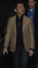 Goro Miyazaki lors de l'avant première de son film Les Contes de Terremer à Paris.